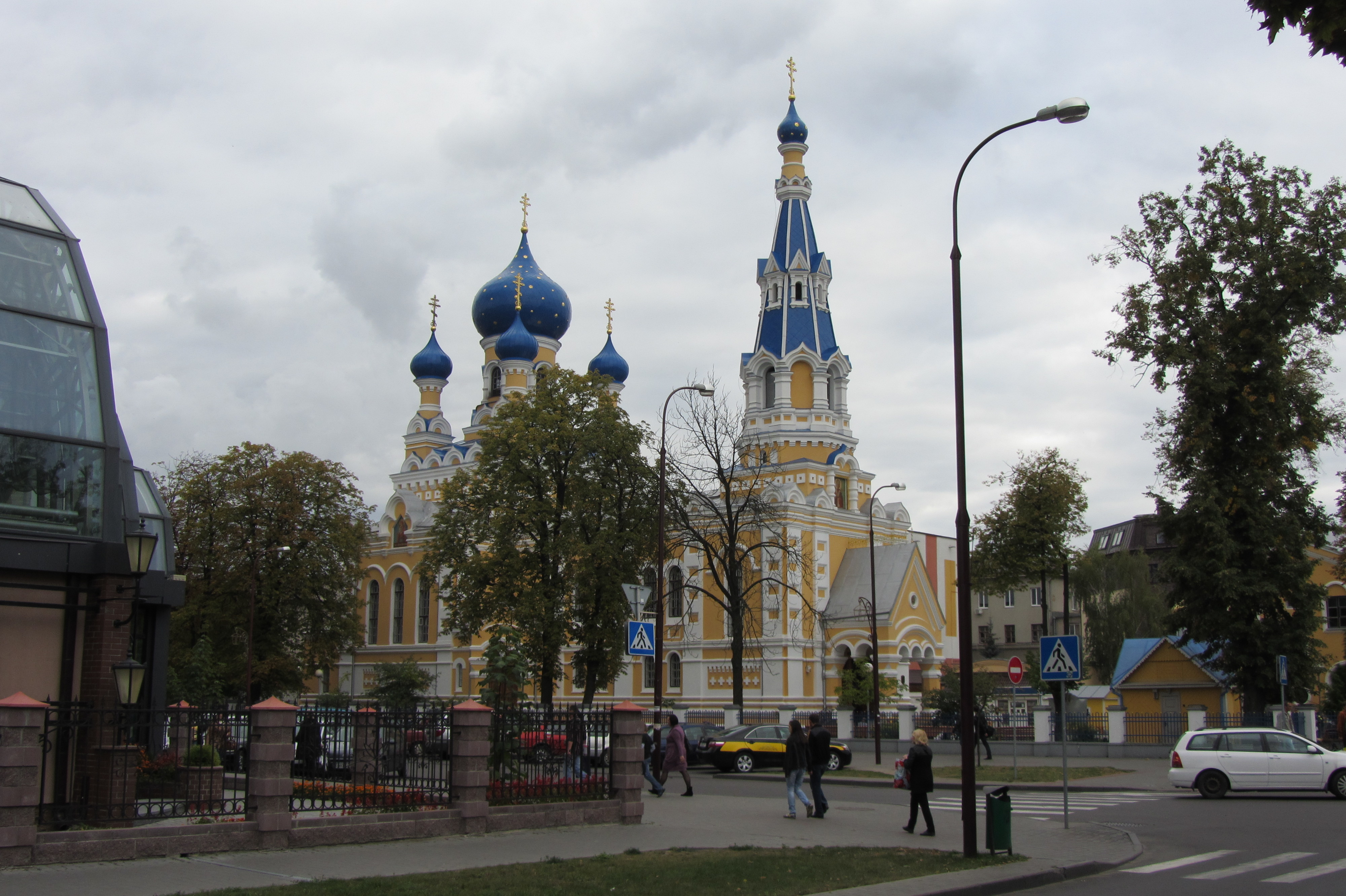 Беларуская (тарашкевіца): Сьвята-Мікалаеўская брацкая царква. г. Берасьце This is a photo of Belarusian heritage monument. Reference number: 113Г000021 ( WLM)